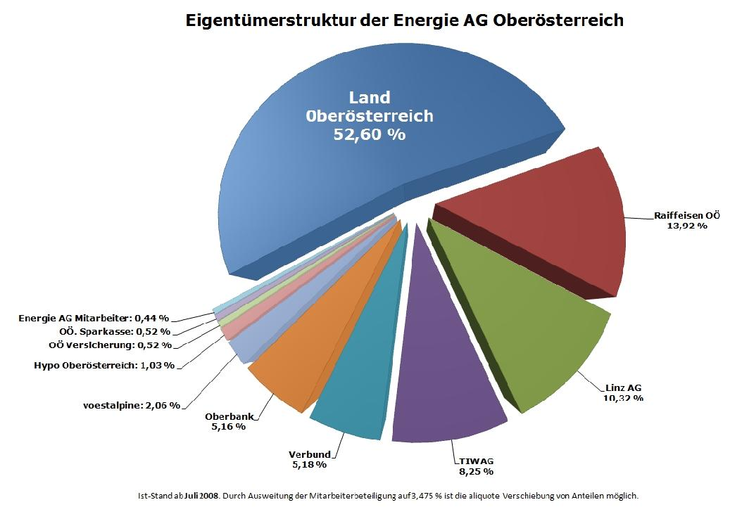 Eigentümerstruktur der Energie AG Oberösterreich als Diagramm.